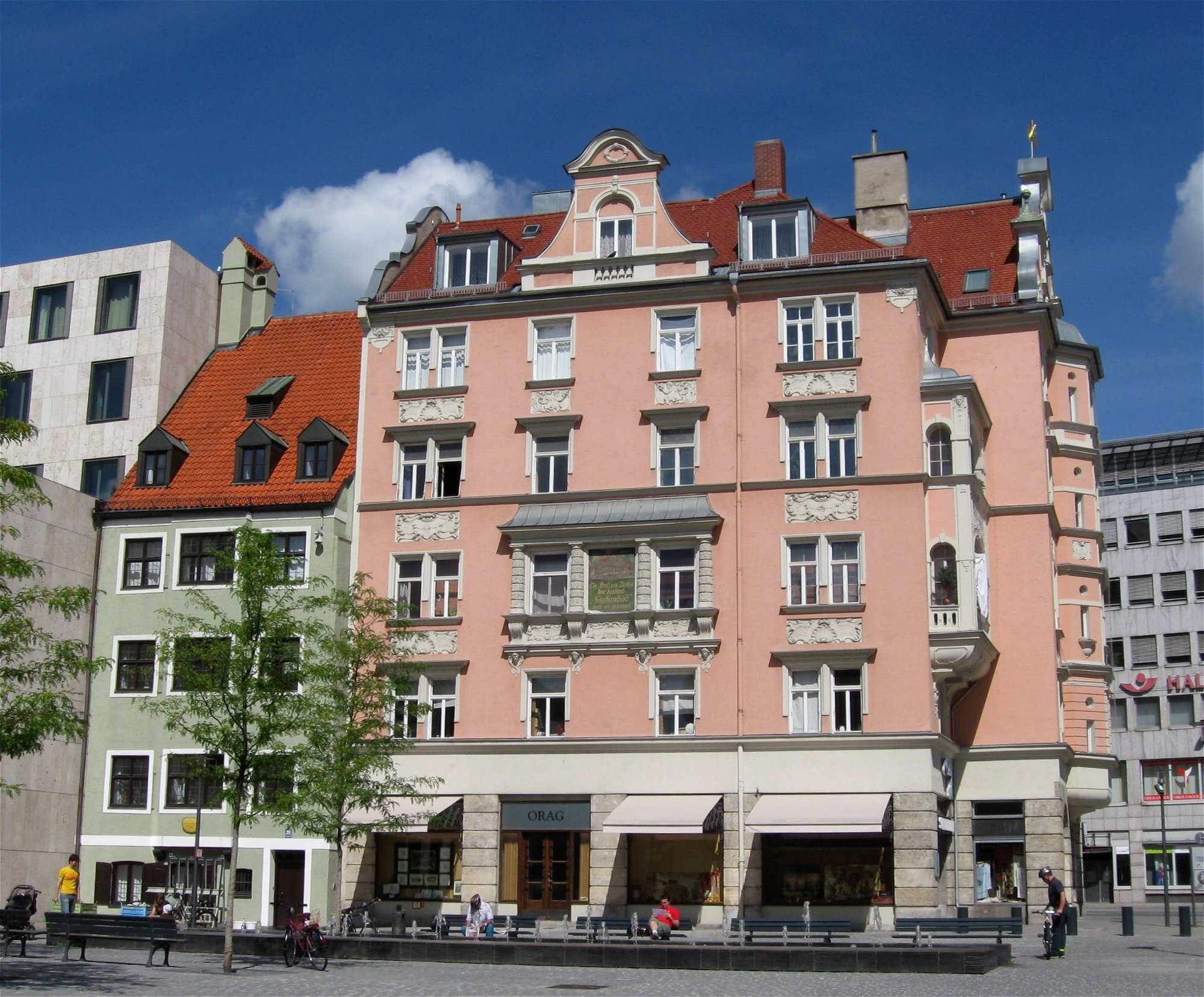 ORAG-Haus - Oberanger 9 - 80311 München - Jakobsplatz, dreiseitig freistehendes Neubarockhaus, errichtet 1896-97 von Johann und Adam Graessel und Max Krauss - Ansicht von Osten - Haus der Bayerischen Schneidereigenossenschaft - Sie wurde 1881 gegründet und beliefert Maßschneider, Schulen, Theater und Opernhäuser sowie private Kunden, in diesem Ladengeschäft, mit Stoffen, Futter, Einlagen, Knöpfen, Fäden, Reißverschlüssen etc. - eine Tafel kündet davon, dass hier einmal ein Bad war: "Ein Bad vor Zeiten hier bestand, Gighanbad war es genannt".